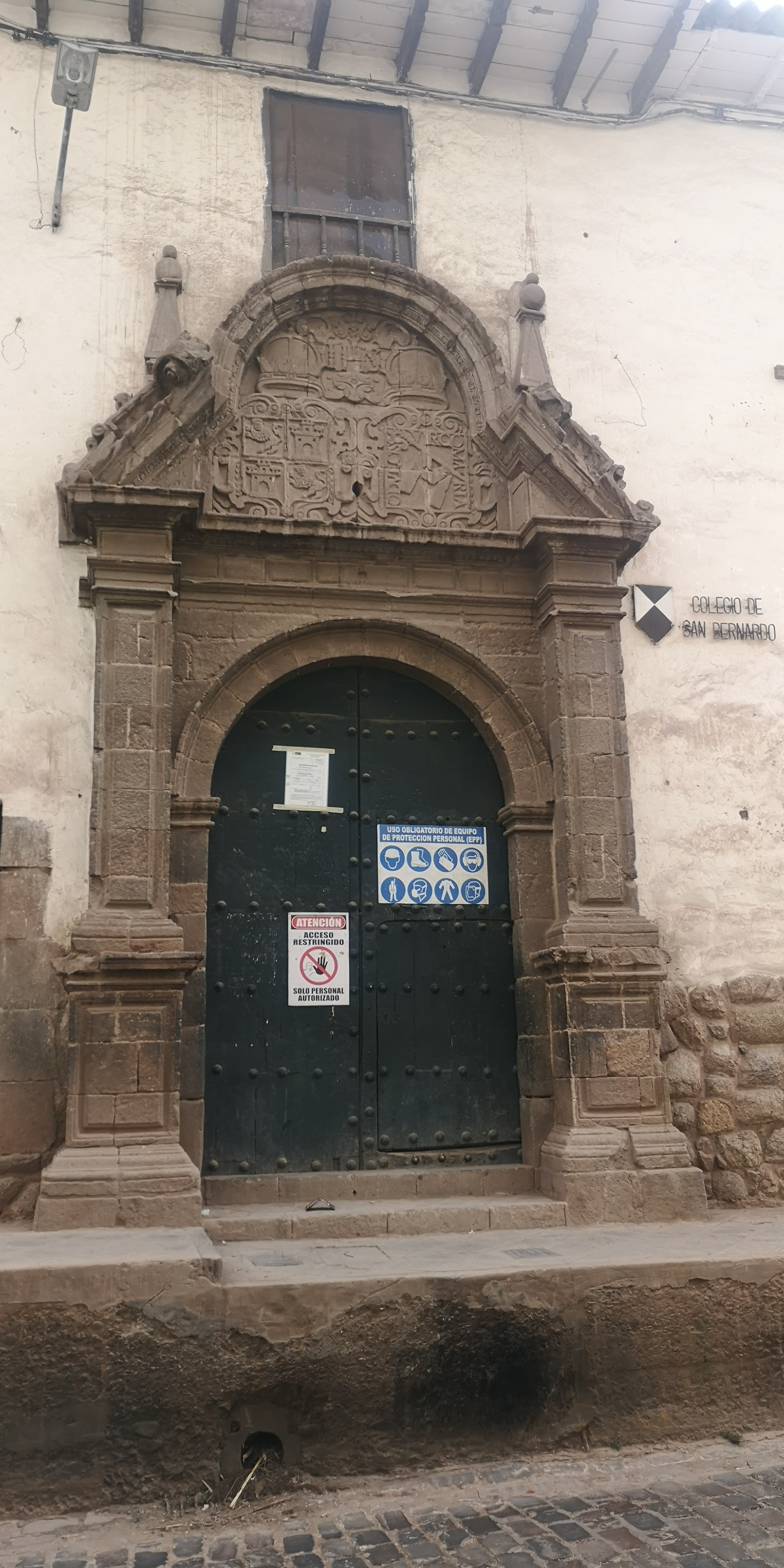 Puerta principal del local del antiguo colegio San Bernardo del Cusco en la calle San Bernardo, Cusco, Perú.